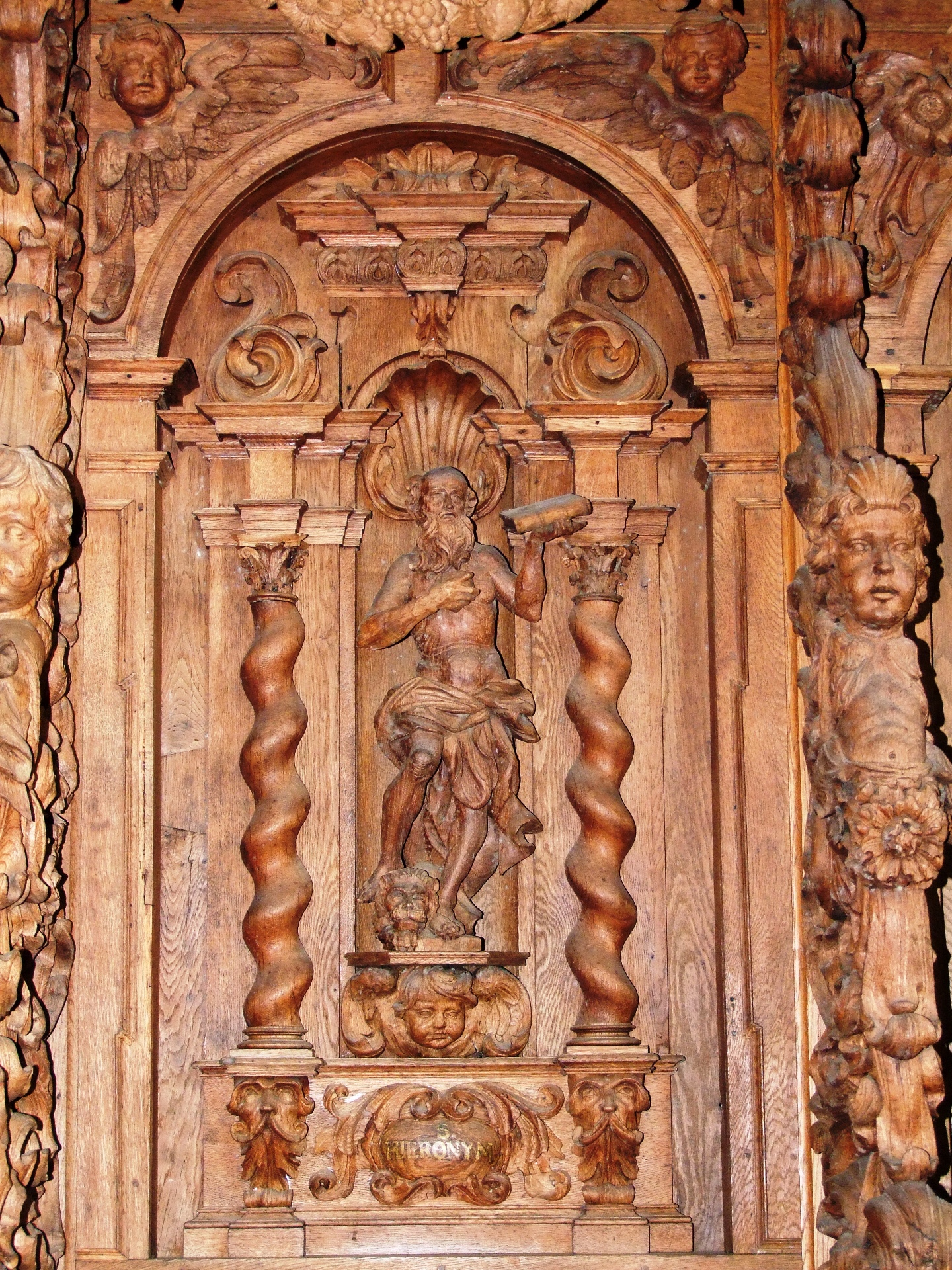 Das Chorgestühl in der Klosterkirche des ehemaligen Kartäuserklosters Buxheim: Hieronymus